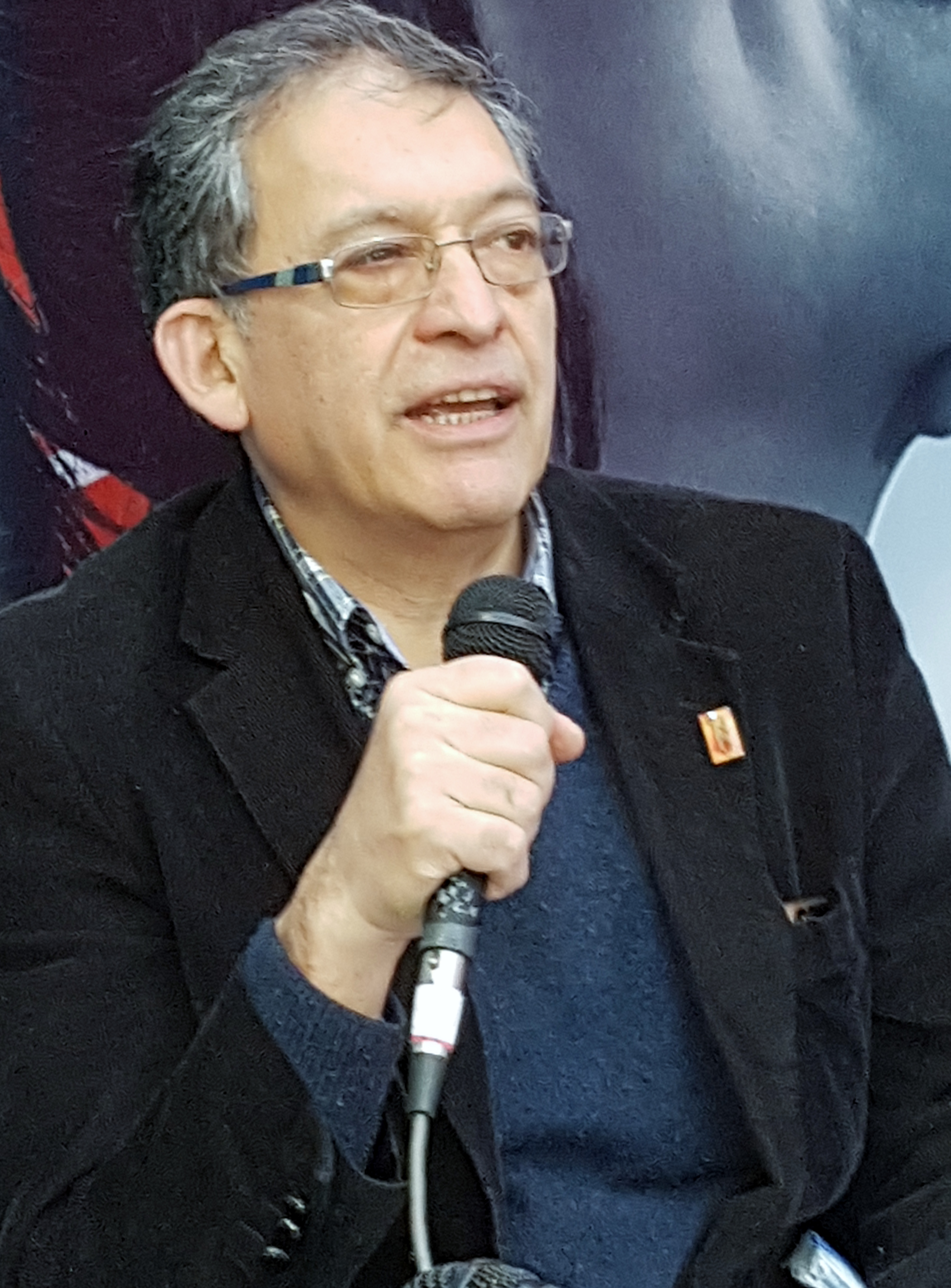 El escritor chileno Miguel de Loyola en la Feria Internacional del Libro de Santiago 2017.